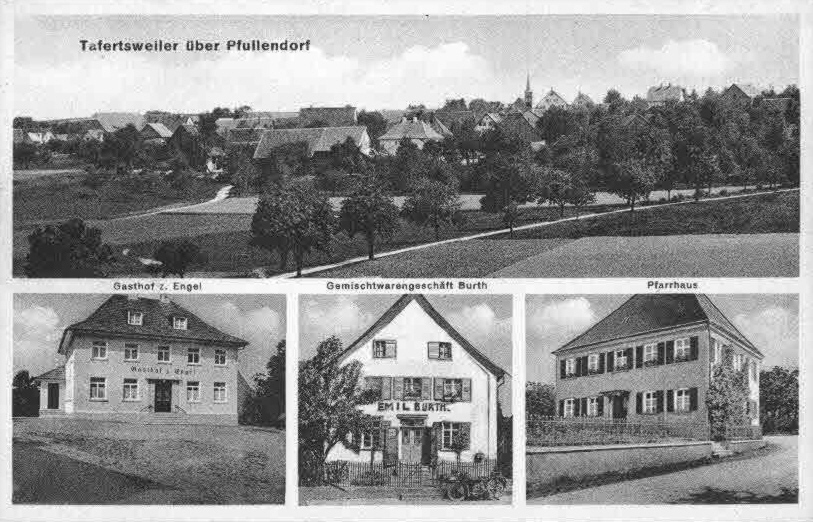 Ansichtskarte von Eugen Felle; Technoseum (Landesmuseum für Technik und Arbeit Mannheim)Motiv: „Tafertsweiler über Pfullendorf“ (heute zu Ostrach)